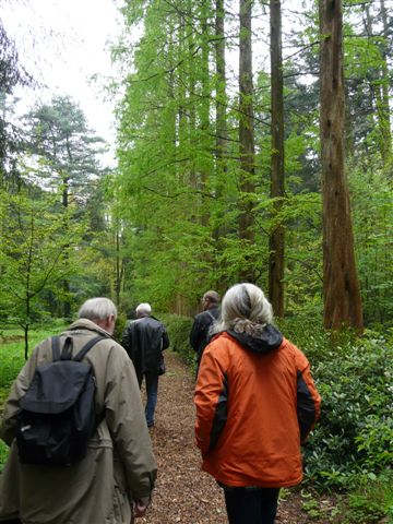 Besucher an der Urweltmammutbaum-Allee (Metasequoia glyptostroboides) in der Sequoiafram Kaldenkirchen